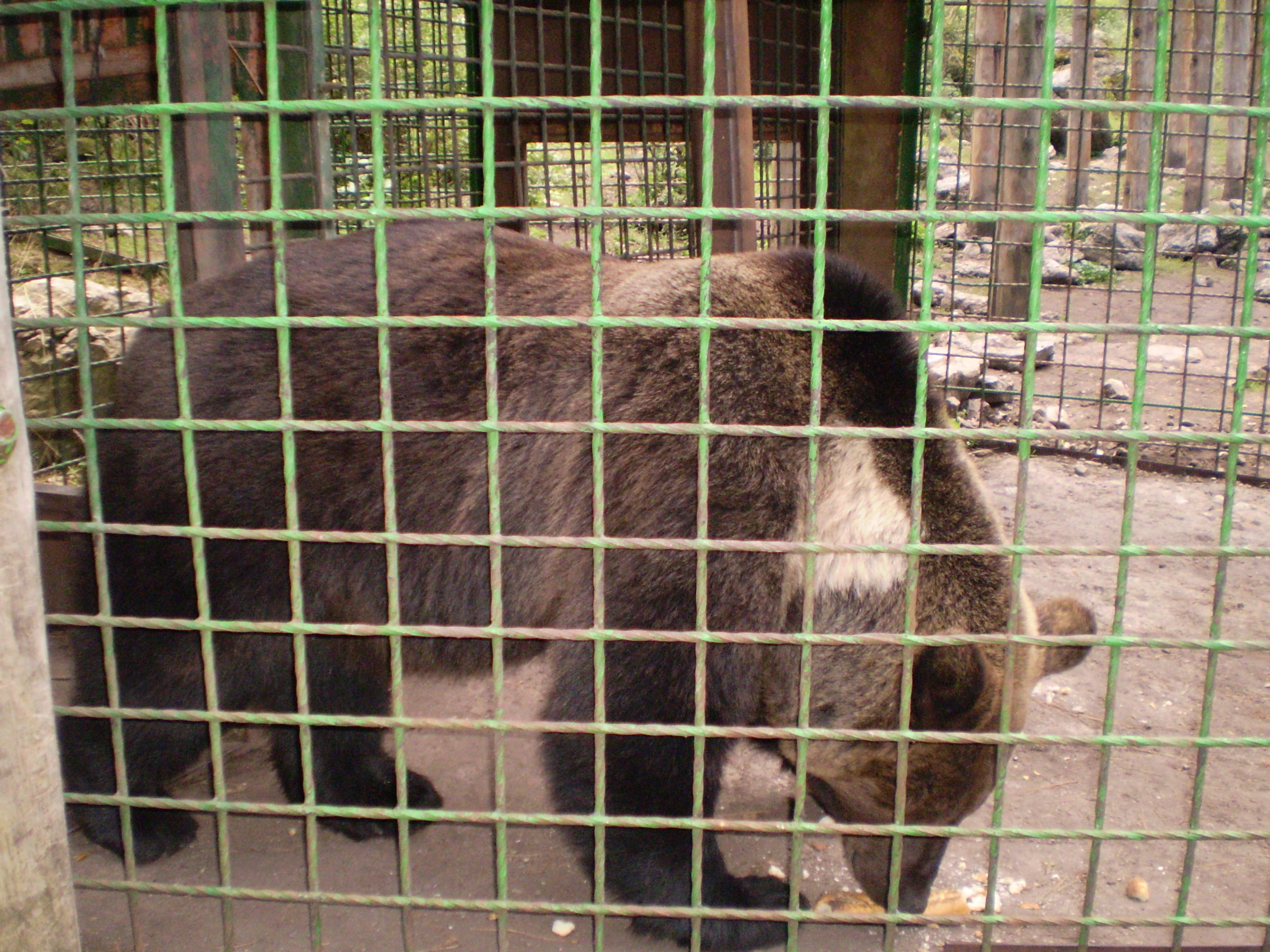 Oso en El Hosquillo